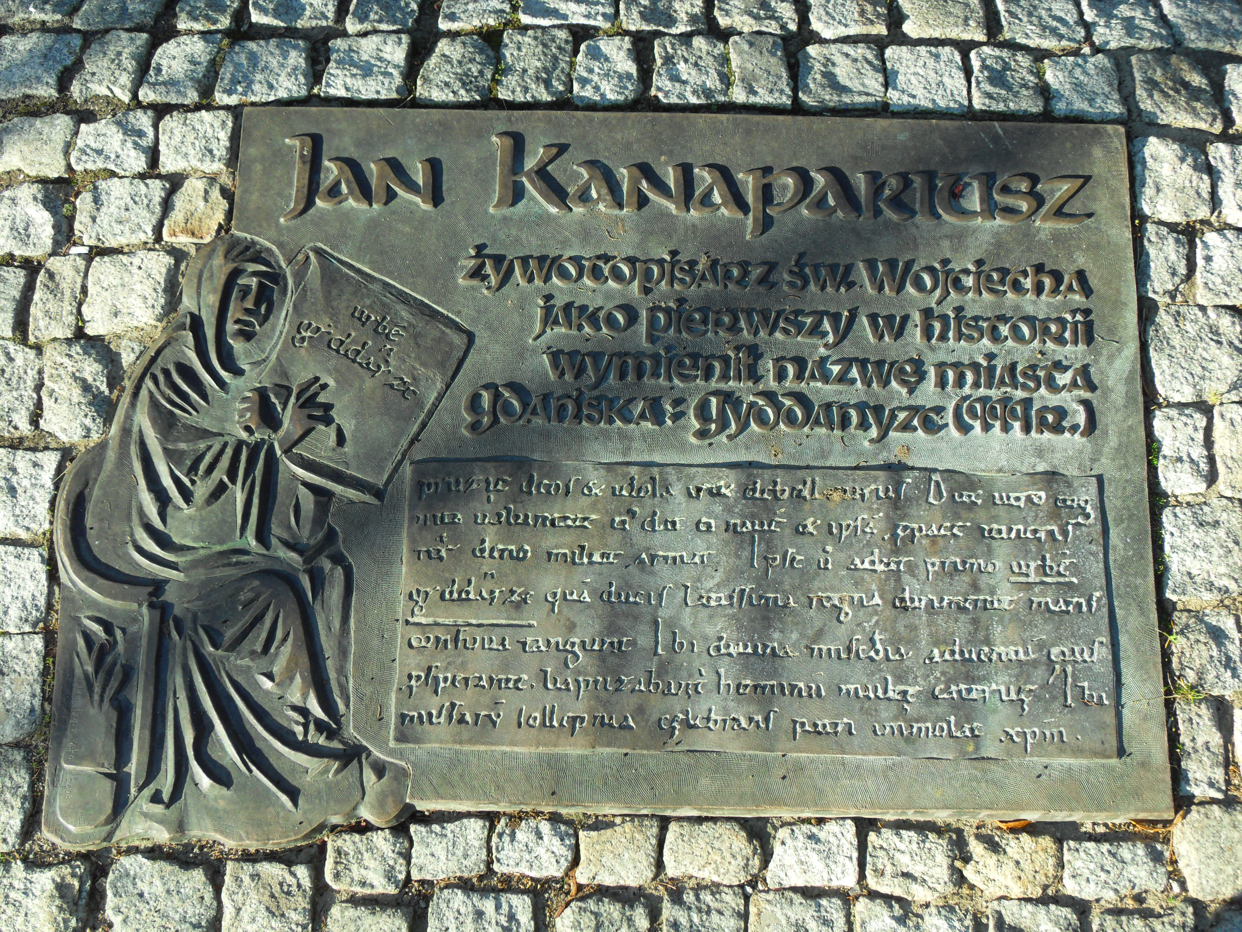 Gdańsk Oliwa, ul. Kanapariusza, tablica Jan Kanapariusz.